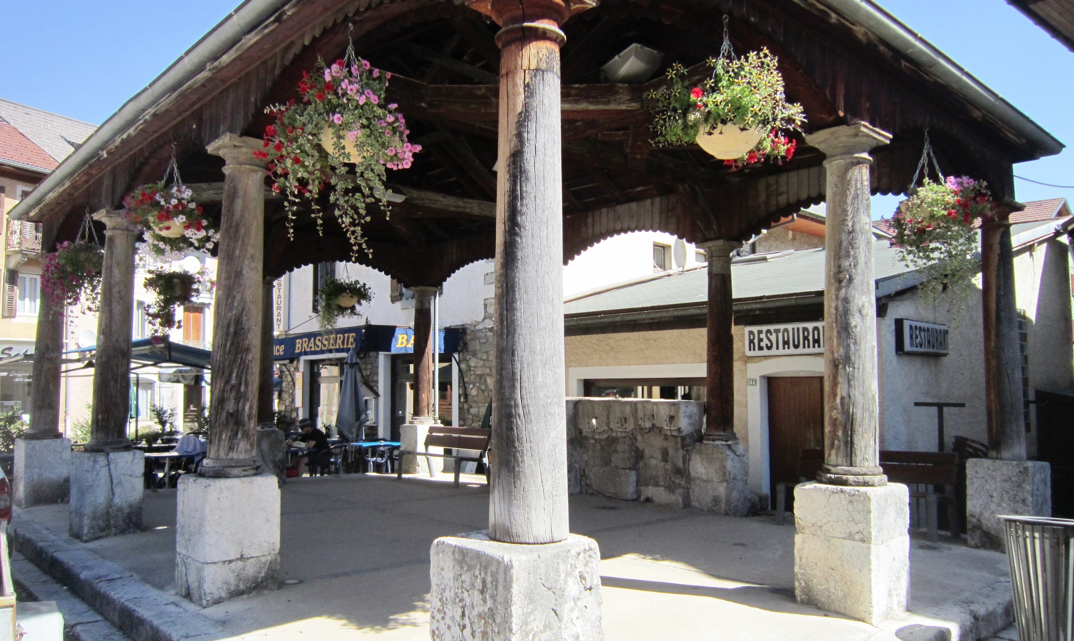 Boëge (Haute-Savoie) : la grenette